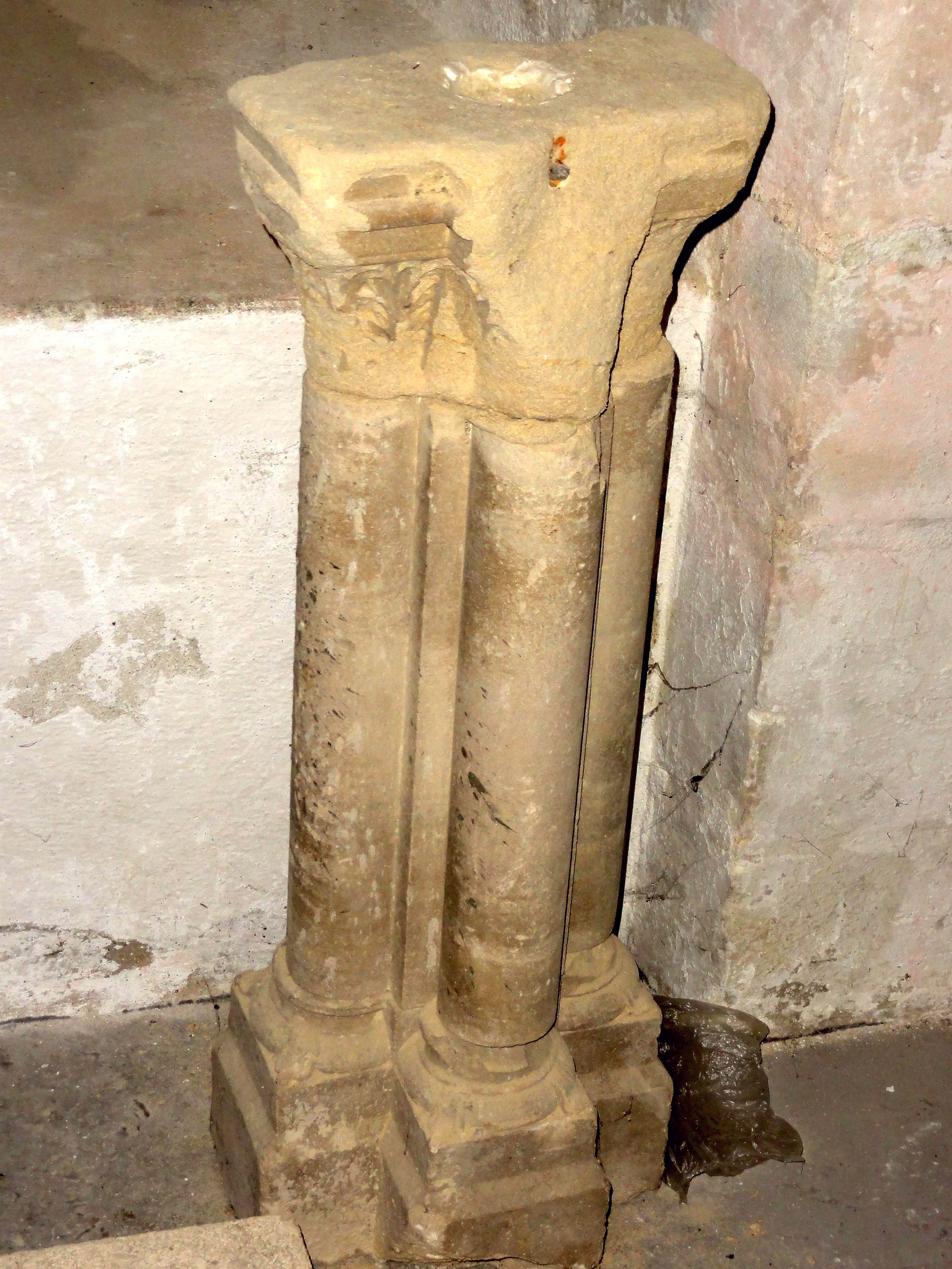 Intérieur de l'église - voir titre.